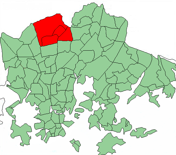 Map of Helsinki highlighting Tuomarinkylä